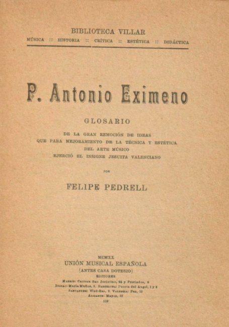 Portada del libro de Felipe Pedrell, Eximeno. Glosario de la gran remoción de ideas que para mejoramiento del arte músico hizo el ilustre jesuita valenciano, Bilbao, Unión Musical Española, 1921.